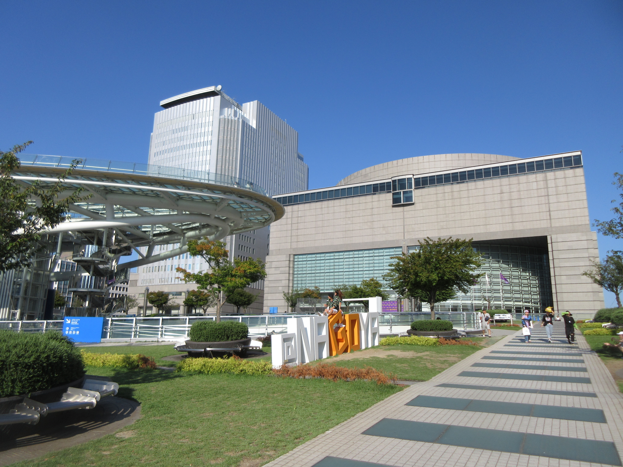 愛知芸術文化センター（名古屋市東区東桜）